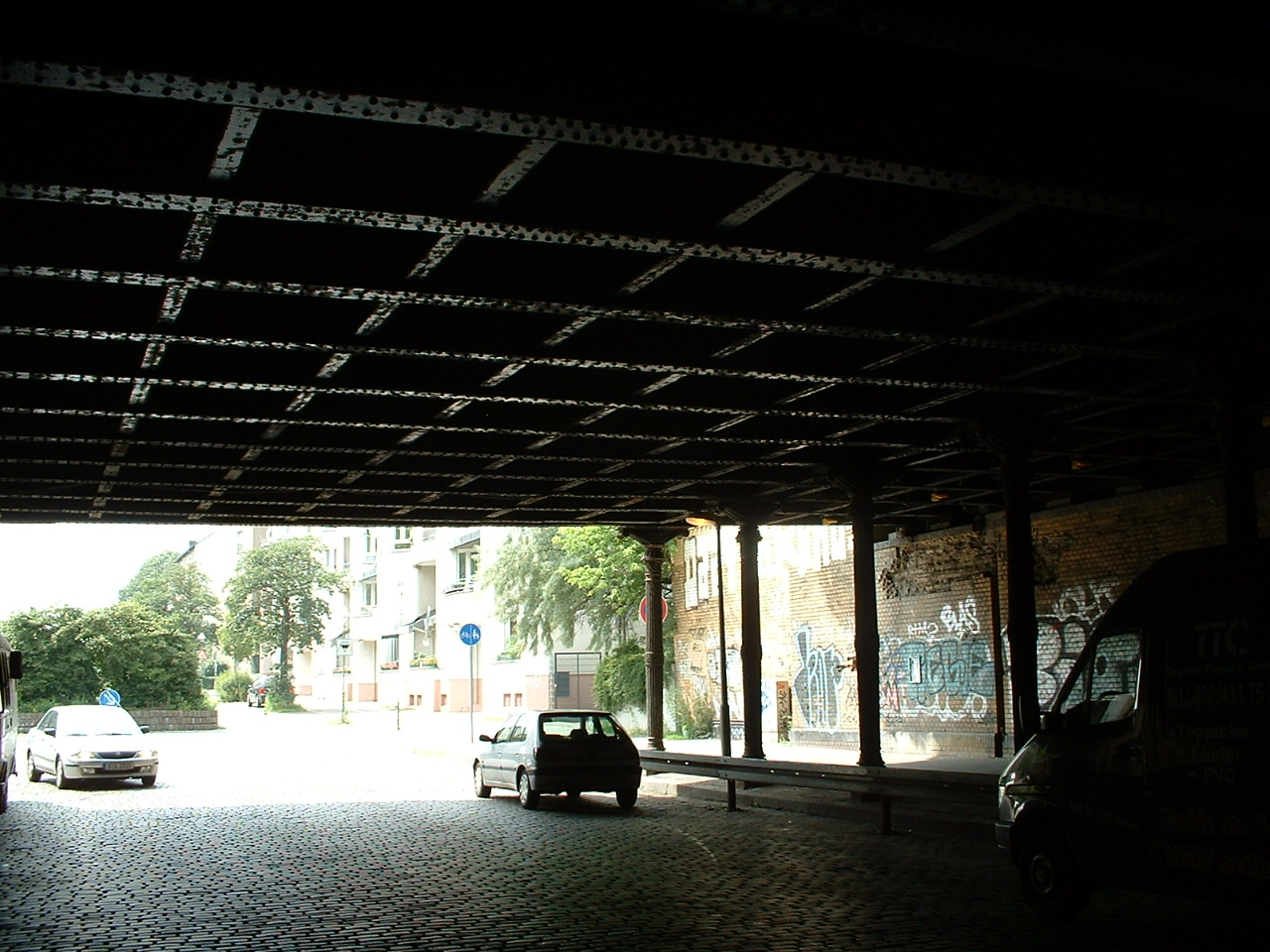 Gleimtunnel, Blick nach Westen und von unten auf das Tragwerk